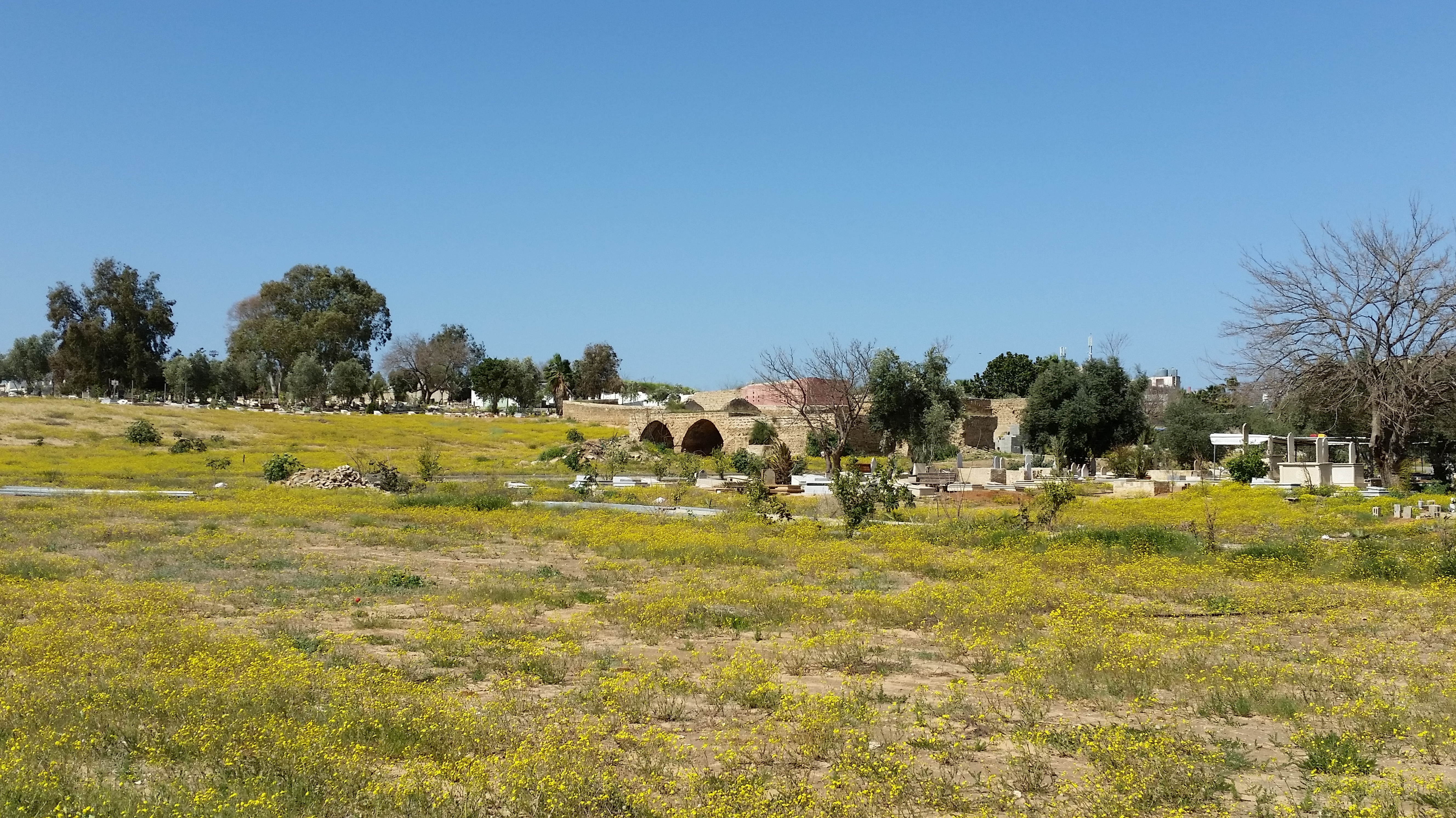 בית קברות טאסו, מול שכונת נוה עופר